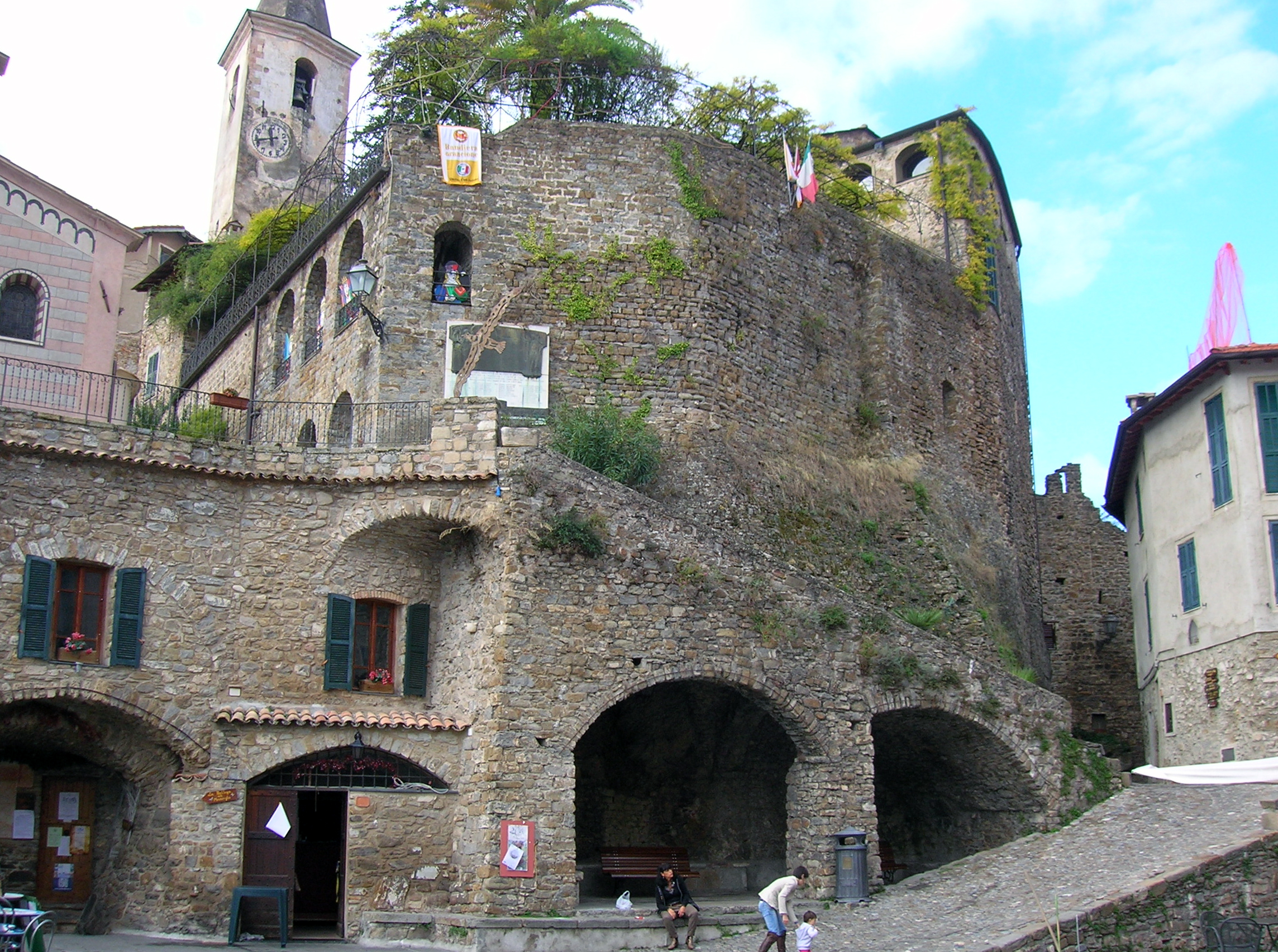 Castello della Lucertola, Apricale, Liguria, Italia.